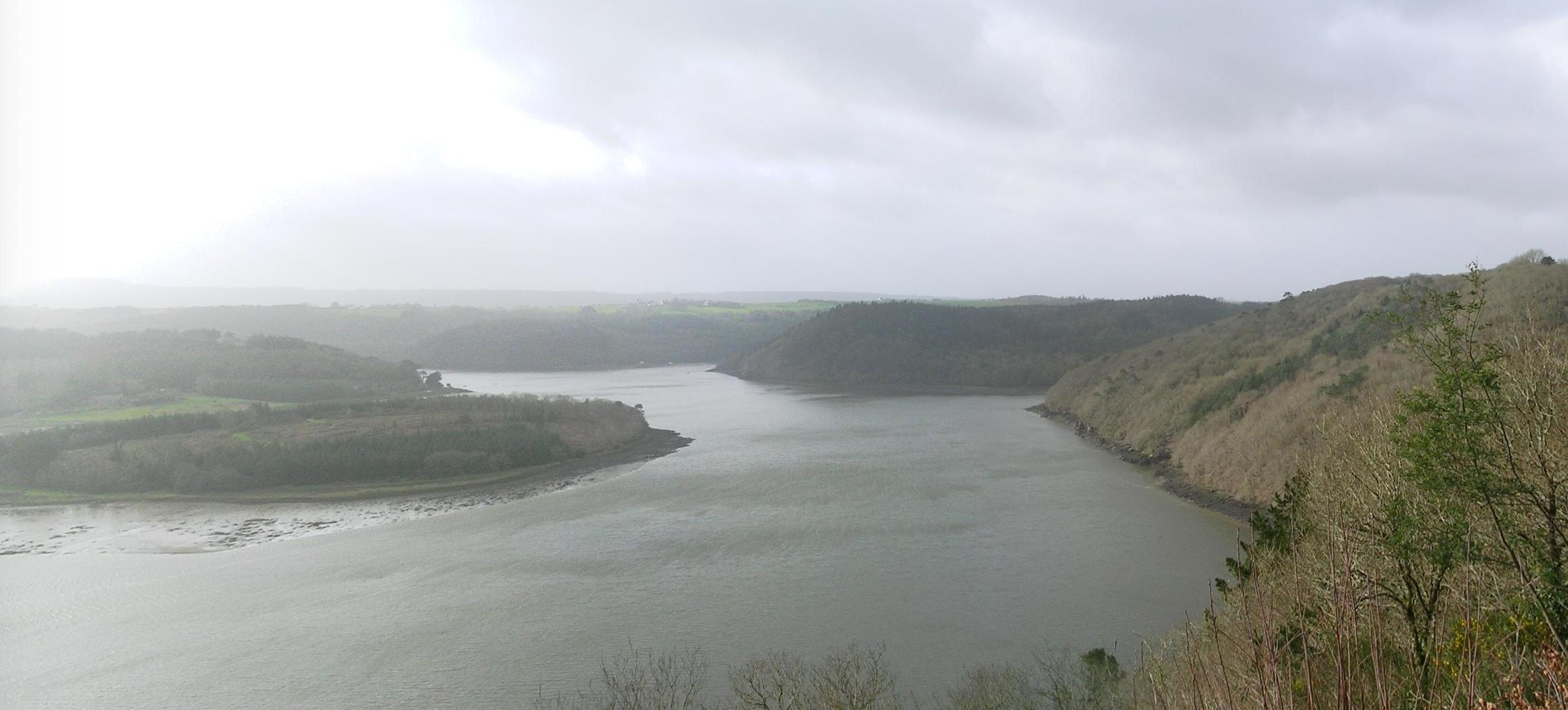 l'Aulne vue des hauteurs de Landévennec, en amont du cimetière de navires.